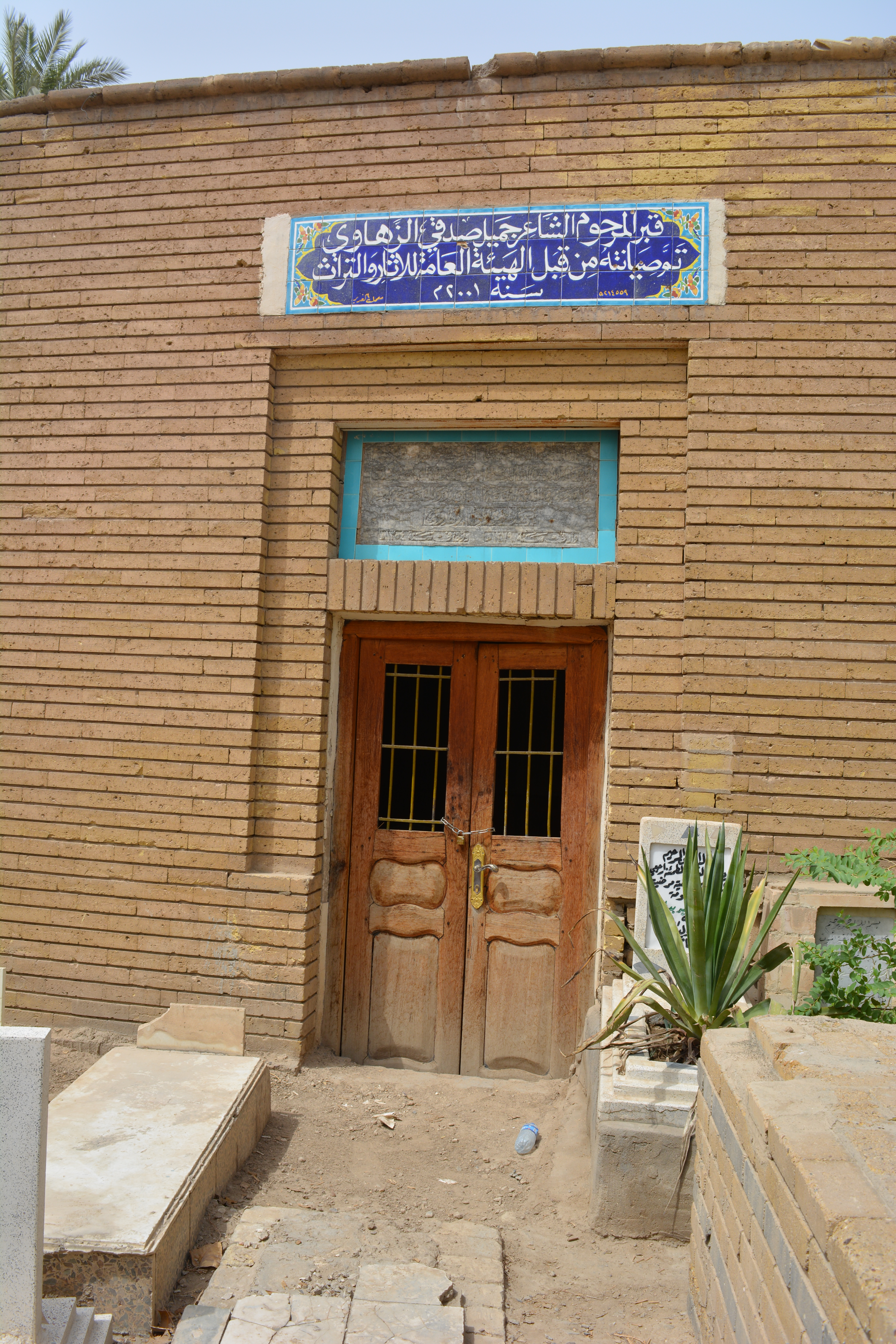 قبر جميل صدقي الزهاوي في حي الأعظمية في مقبرة الخيزران ببغداد